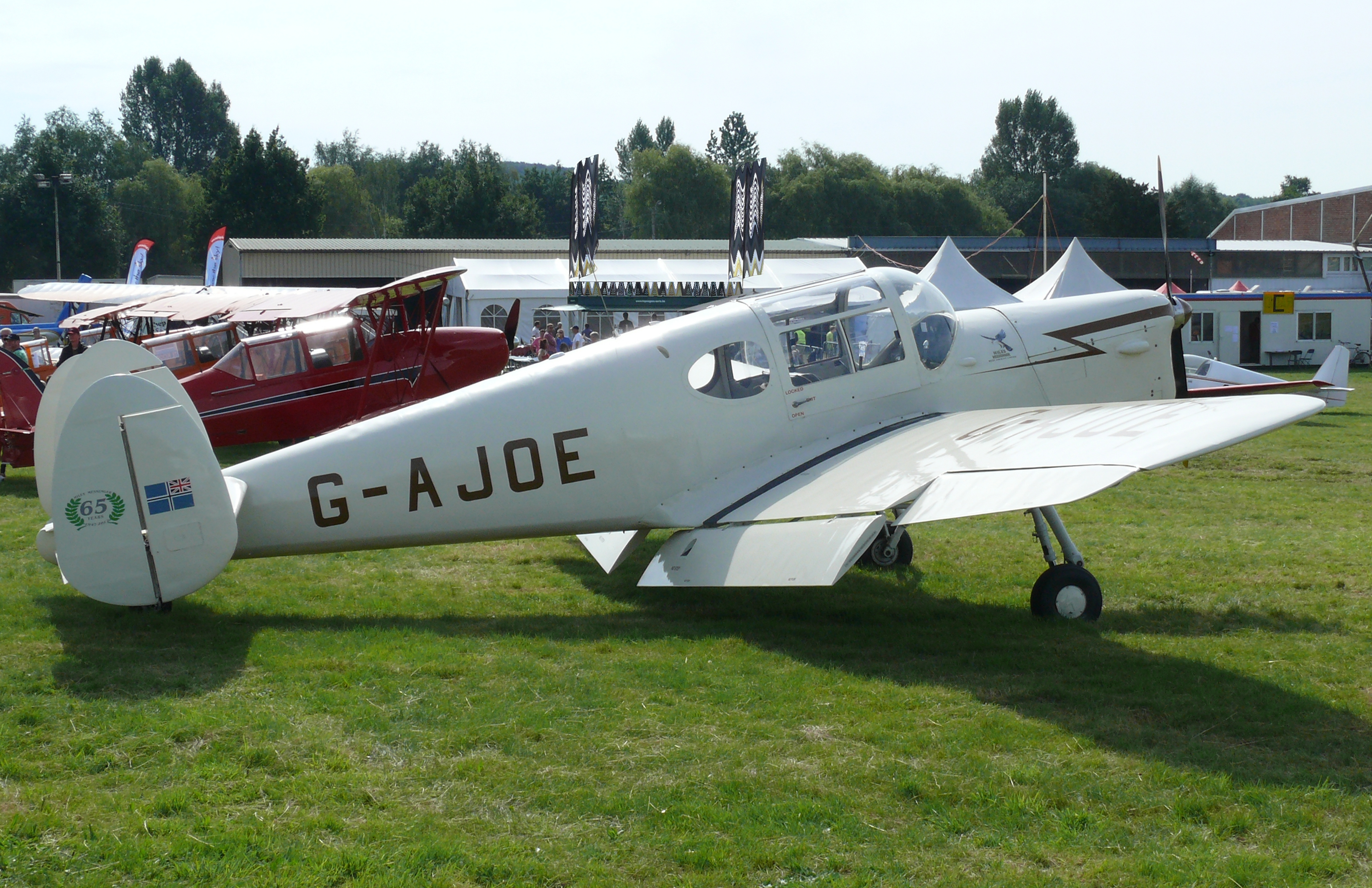 Miles M-38 Messenger 2A G-AJOE (cn 6367), built in 1947, op de Schaffen Fly and Drive In 2012.